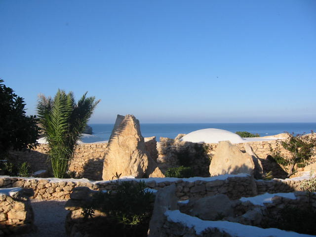 Tipico Dammuso del Borgo di Cala creta - lampedusa